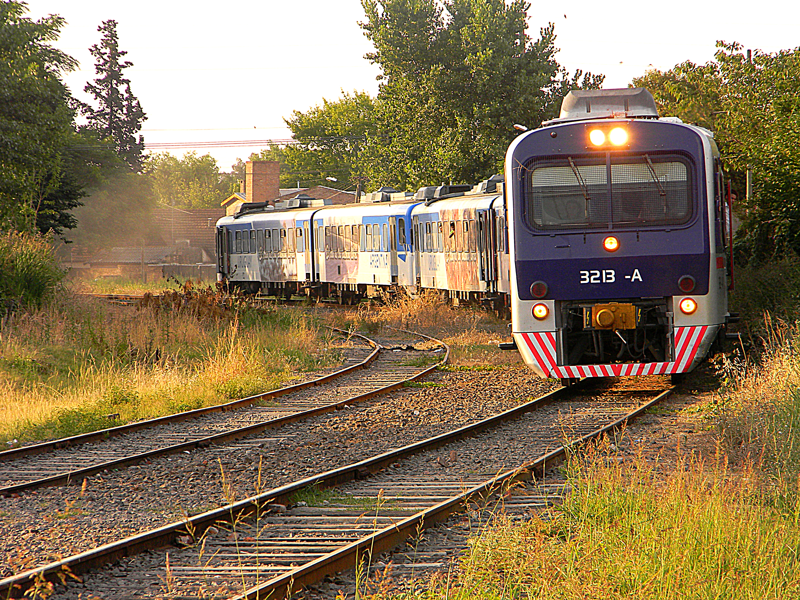 Nuevo "Gran Capitan".